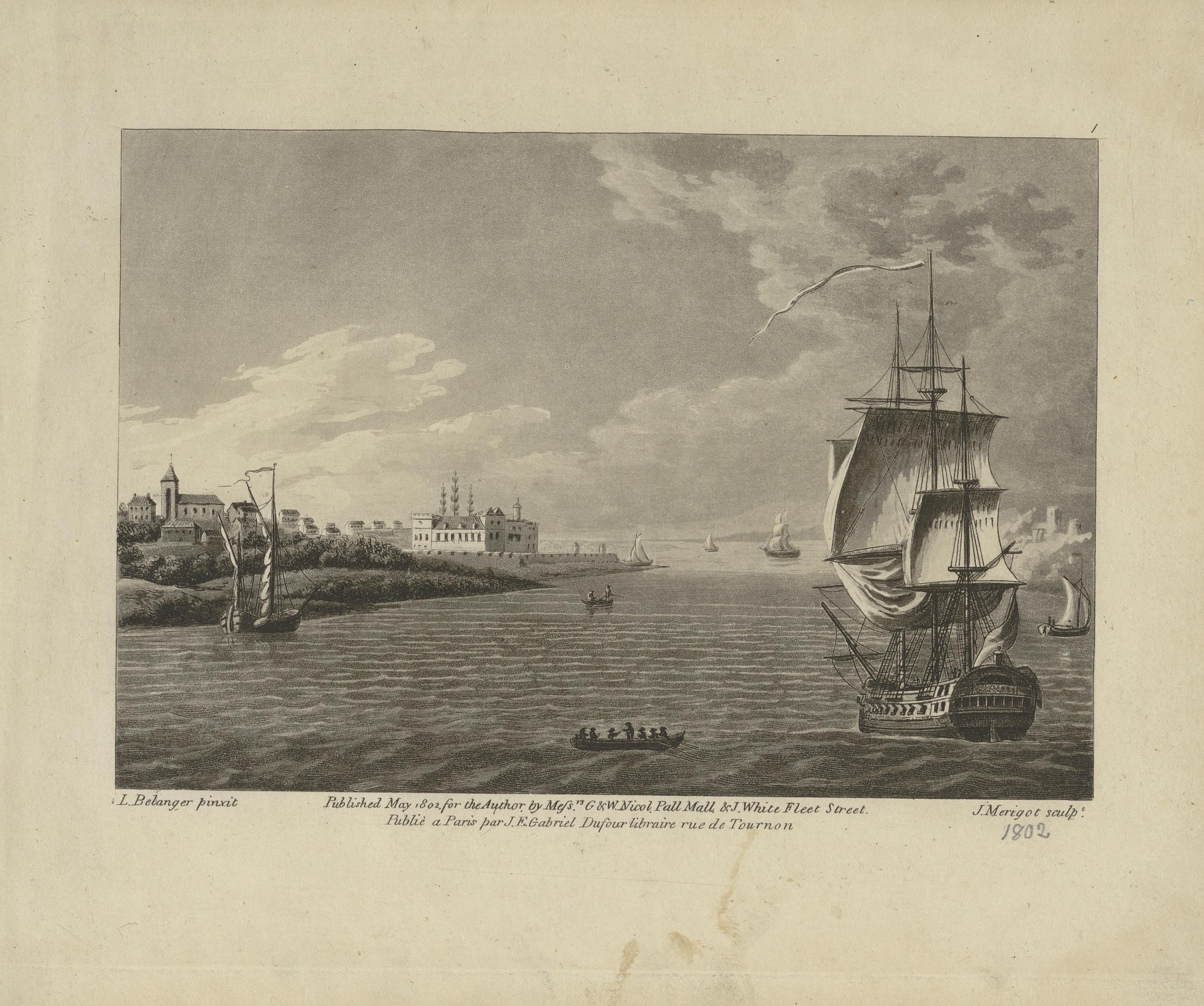 Vue du Château de Cronembourg, d'une Partie de la Ville d'Elsineur, et de celle d'Helsimborg en Suède.